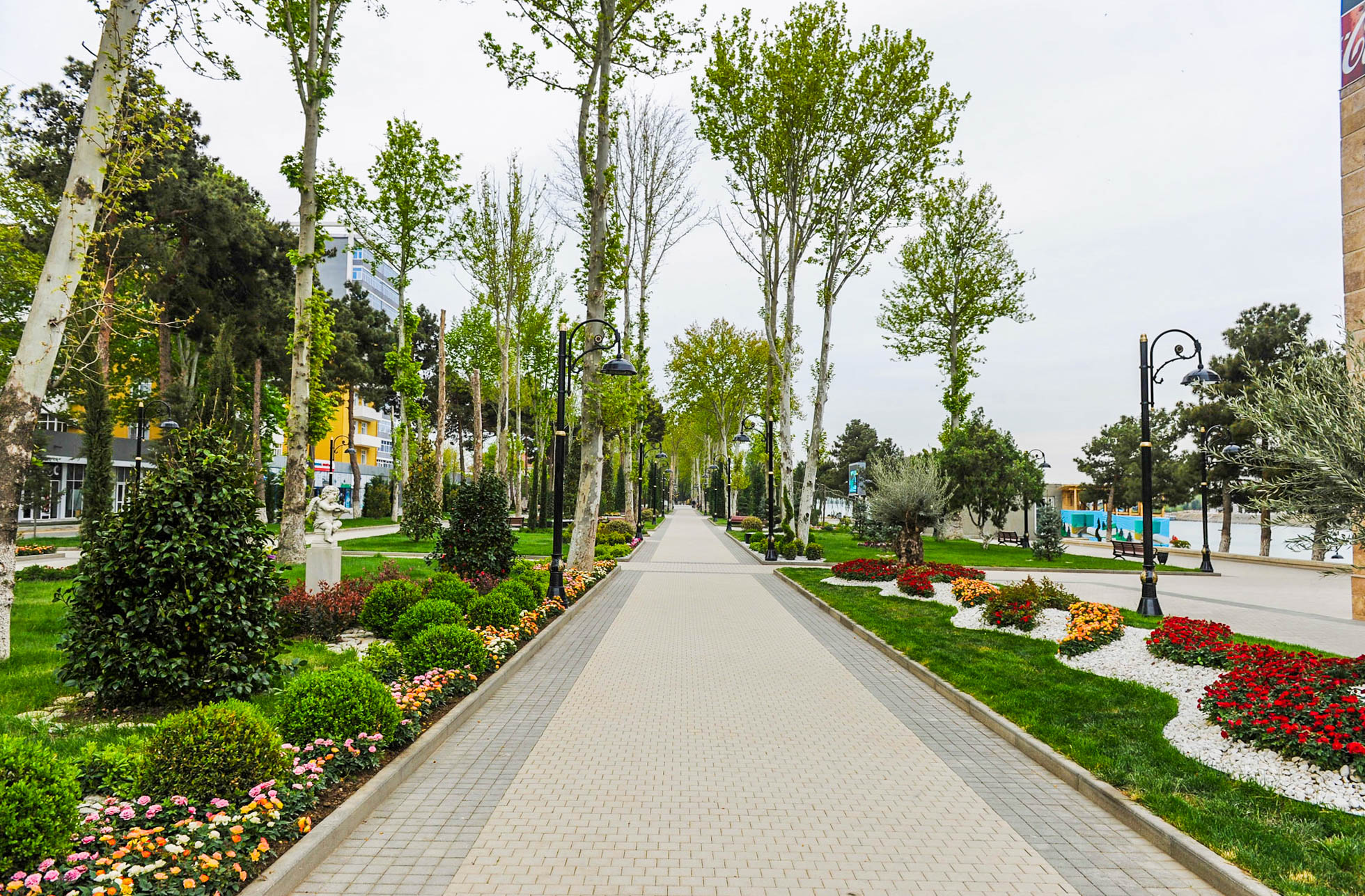 Mingəçevir dənizkənarı bulvarı